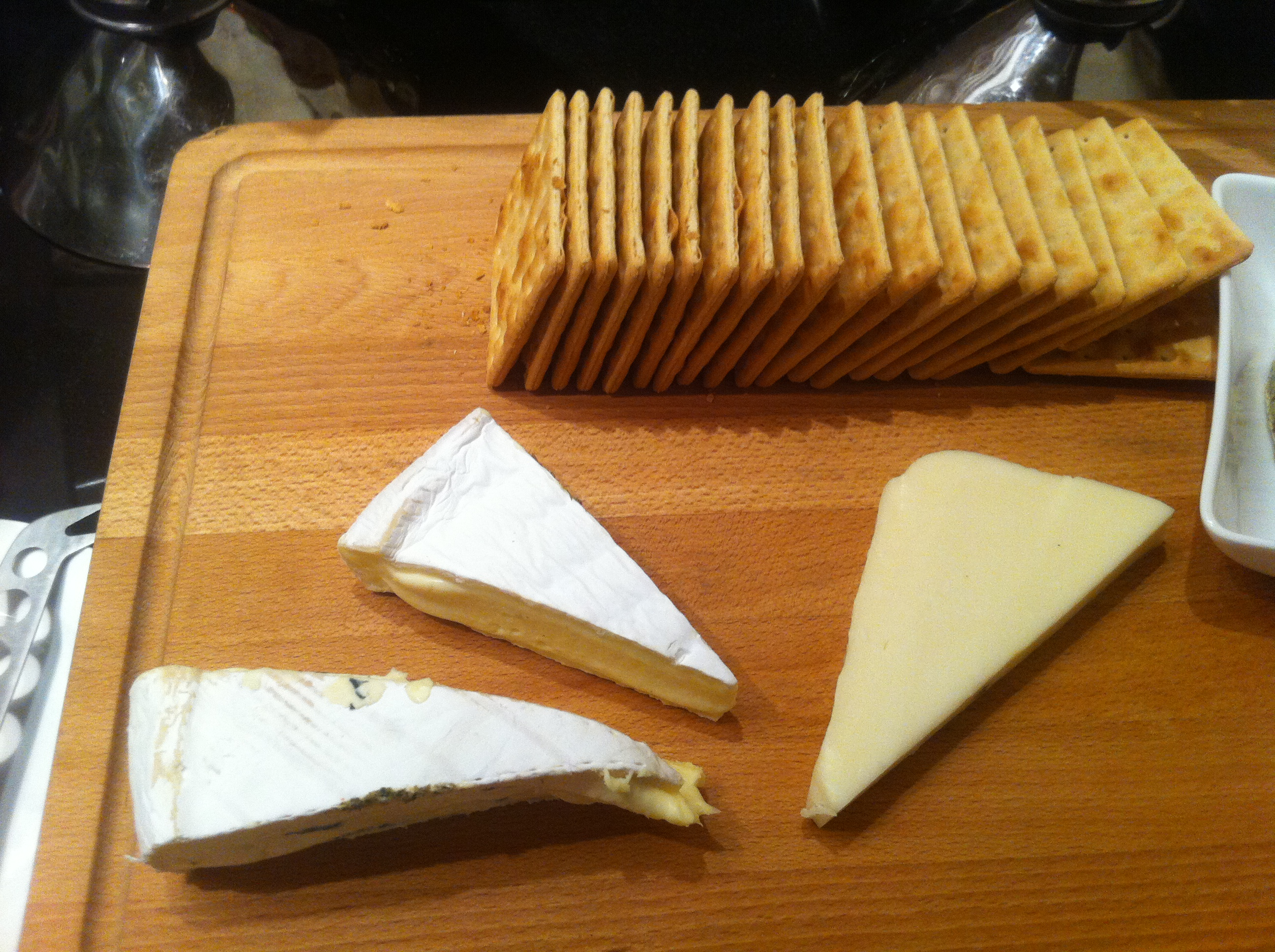 中文（香港）: 香港怡東酒店 自助餐 食物